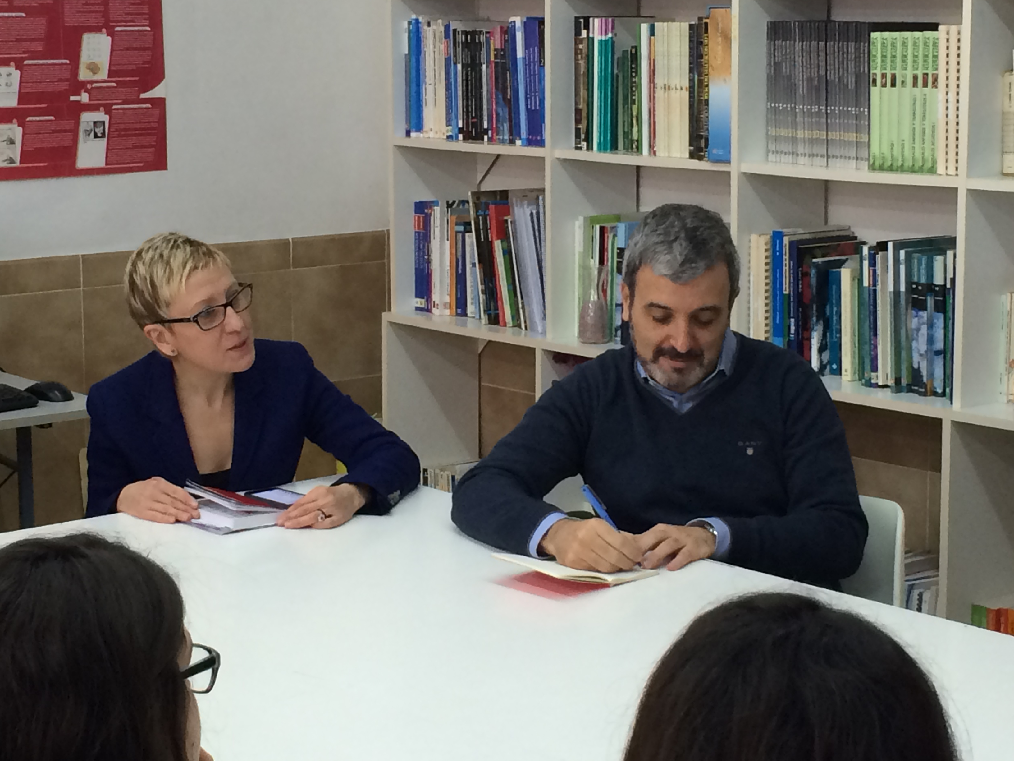 Carmen Andrés Añón (izquierda) y Jaume Collboni (derecha) en febrero de 2015.